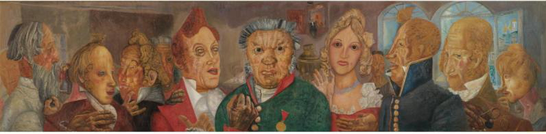 Борис Григорьев. Ревизор